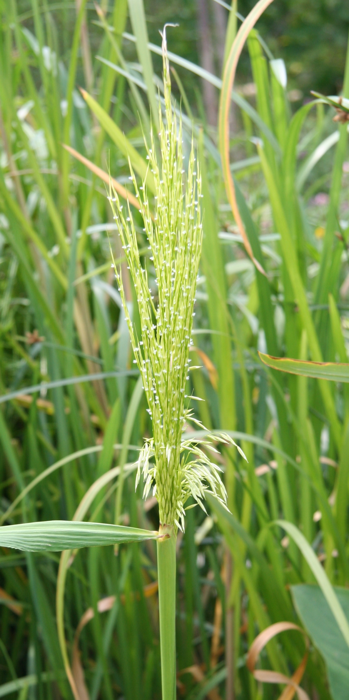 Zizania aquatica im Botanischen Garten Dresden